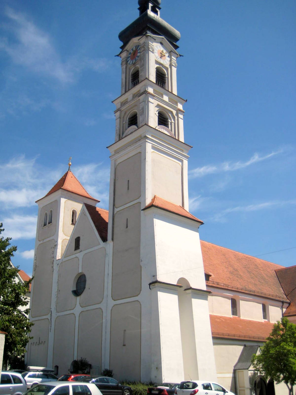 Geisenfeld, ehemalige Klosterkirche Mariae Himmelfahrt, jetzt Pfarrkirche St. Emmeram